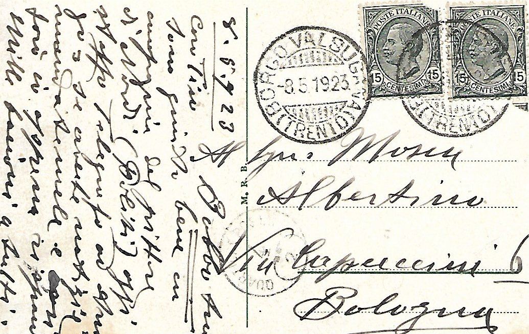 Borgo Valsugana - Castel Telvano - retro